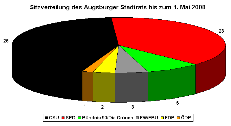 Sitzverteilung des Augsburger Stadtrats bis zum 1. Mai 2008